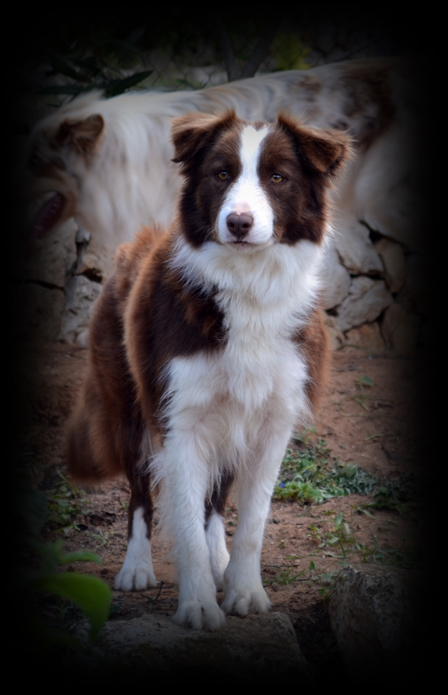 Border Collie Hembra Chocolate